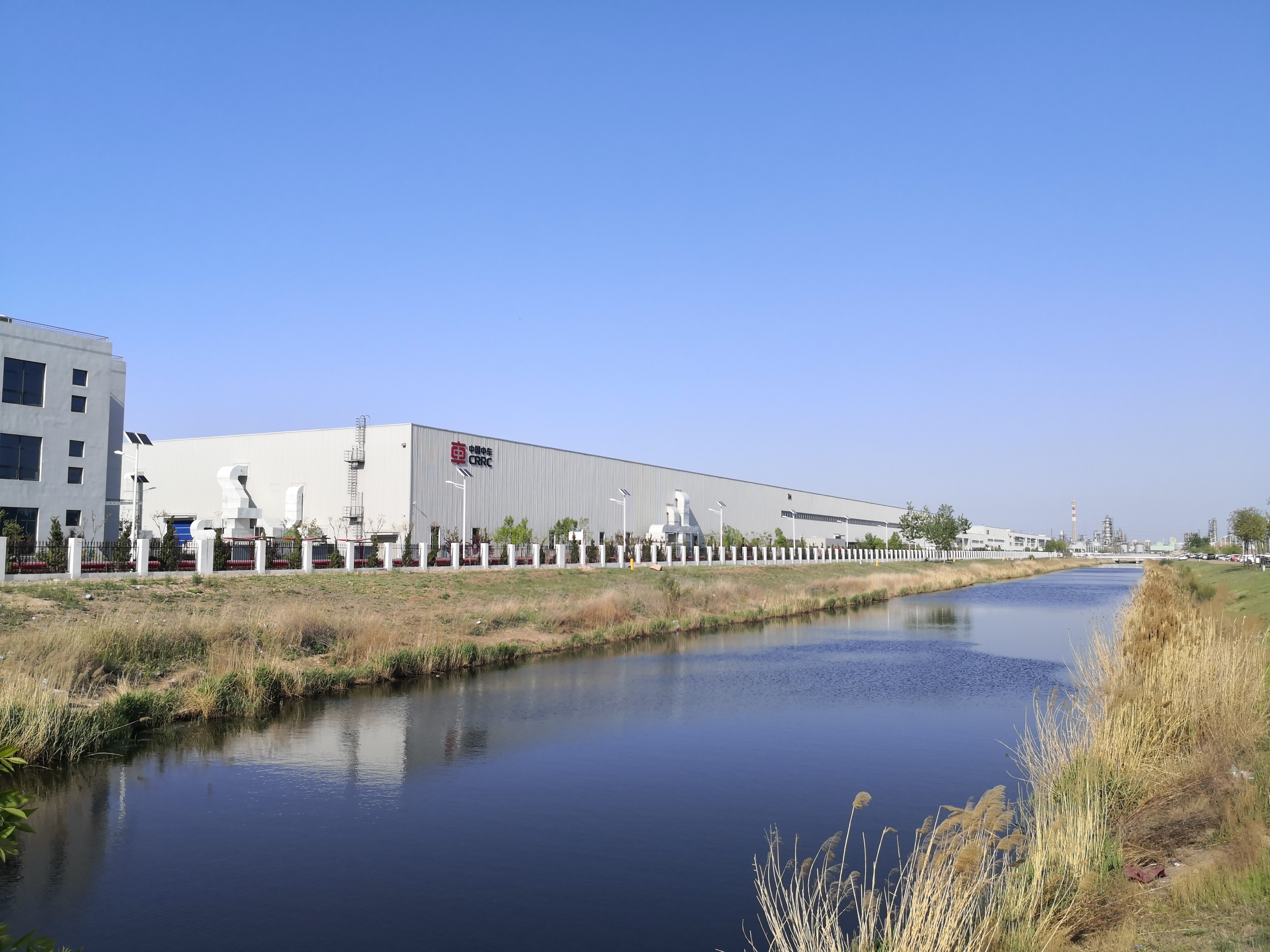 中车青岛四方机车车辆棘洪滩制造基地厂房